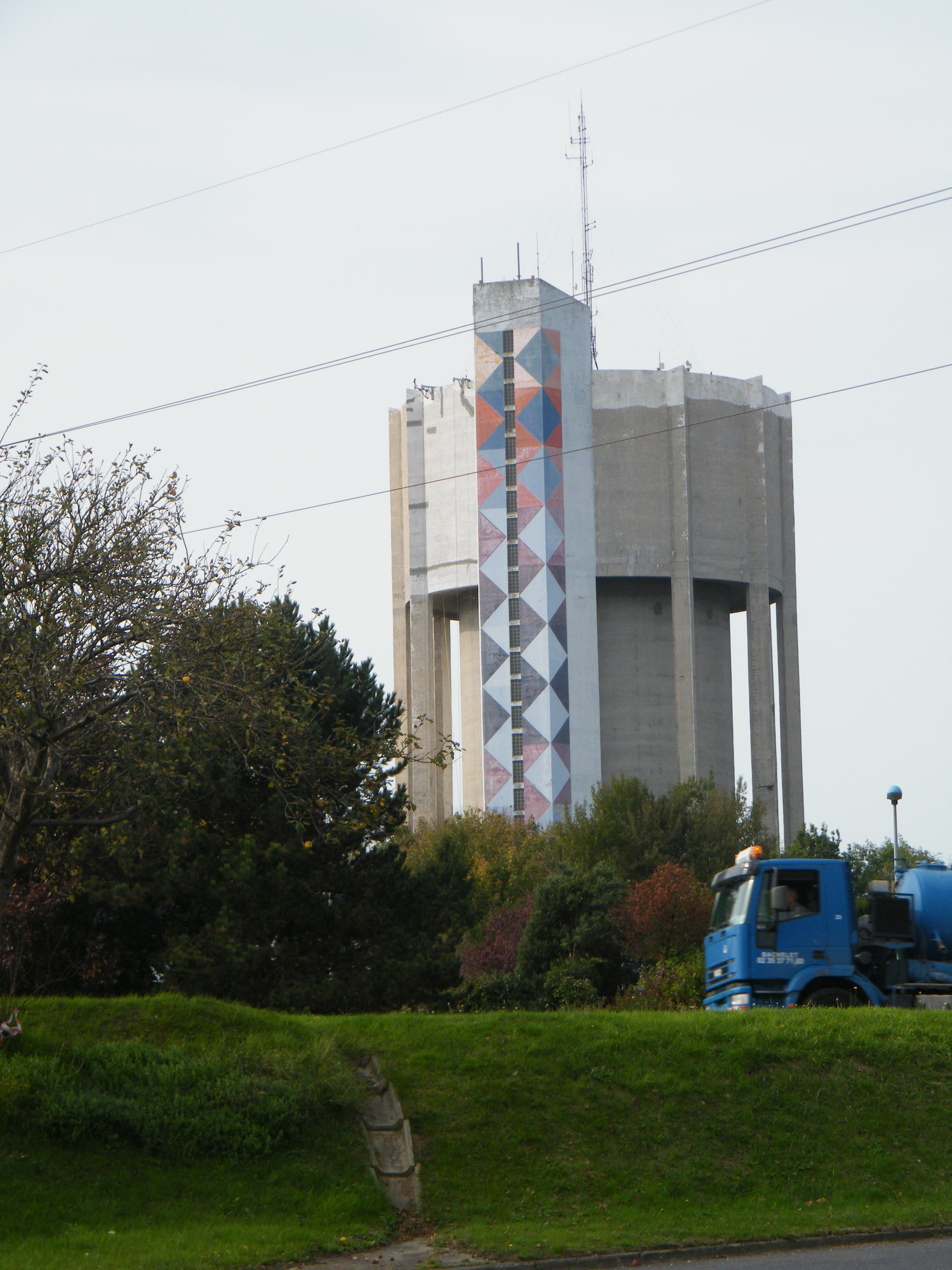 Dieppe (Seine-maritime), Val Druel, château d'eau.